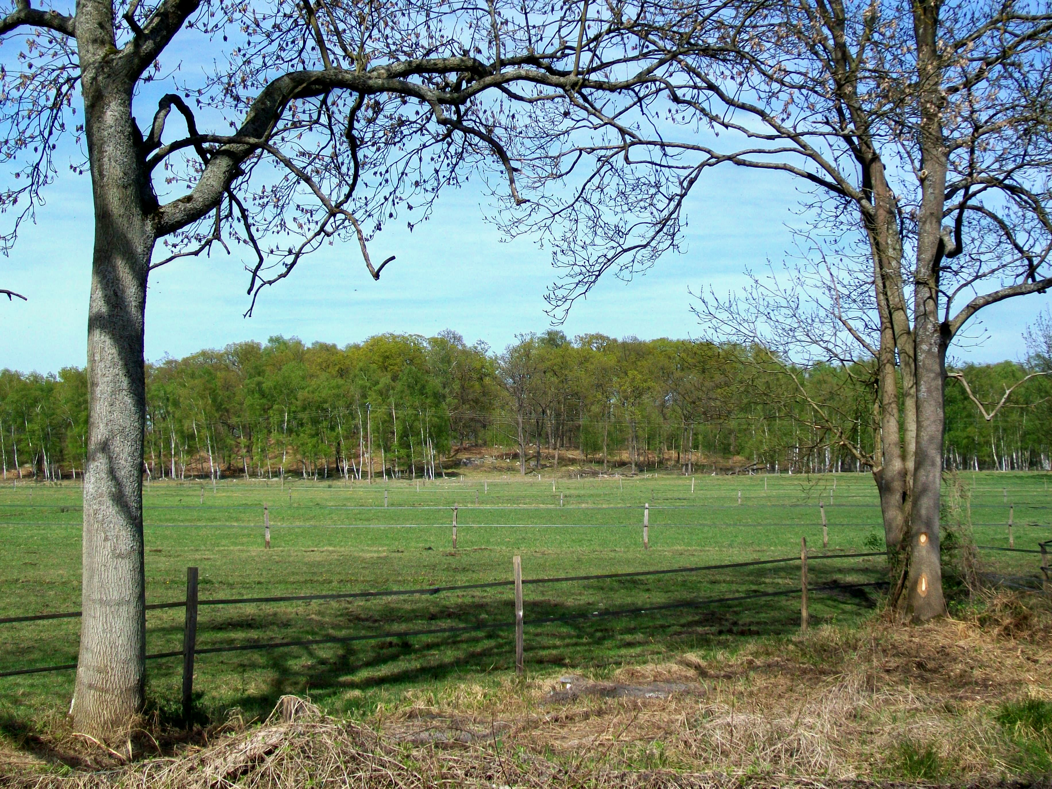 La prairie de Charlepont, qui faisait jadis partie du domaine de Vallière.